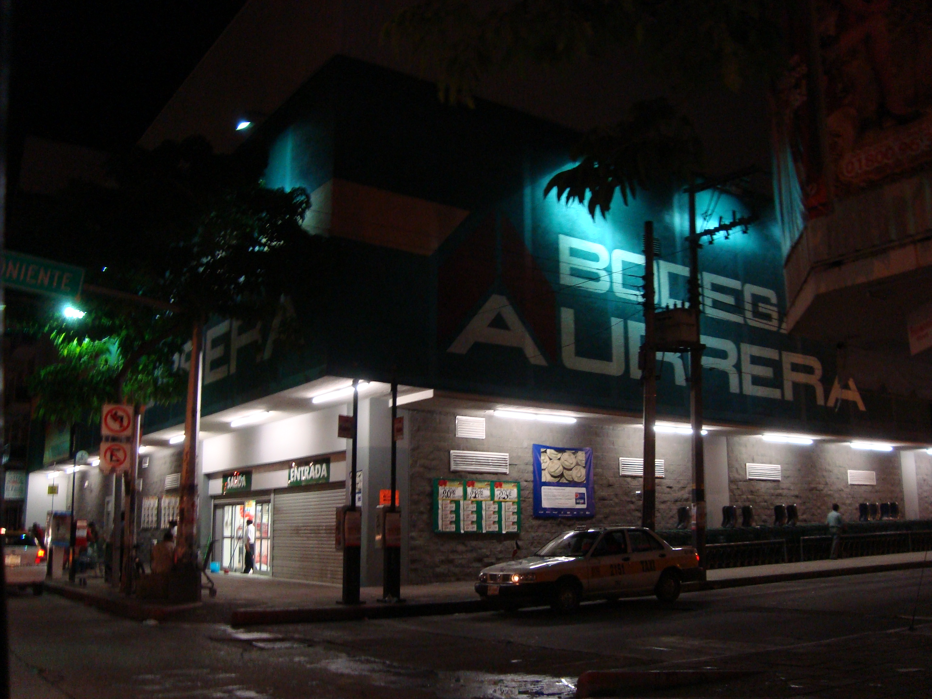 Bodega Aurrerá de Noche en Tuxtla Gutiérrez